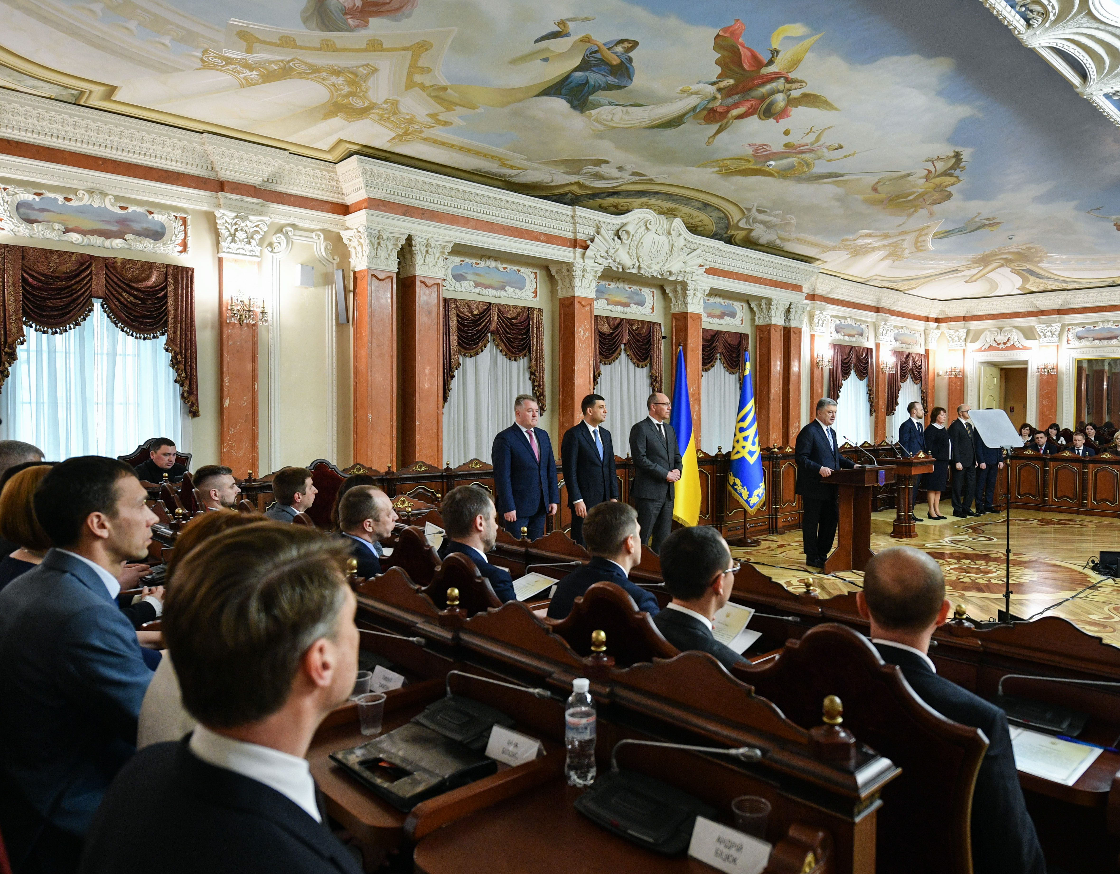 Церемонія присяги перших суддів Вищого антикорупційного суду України в присутності Президента України Петра Порошенка